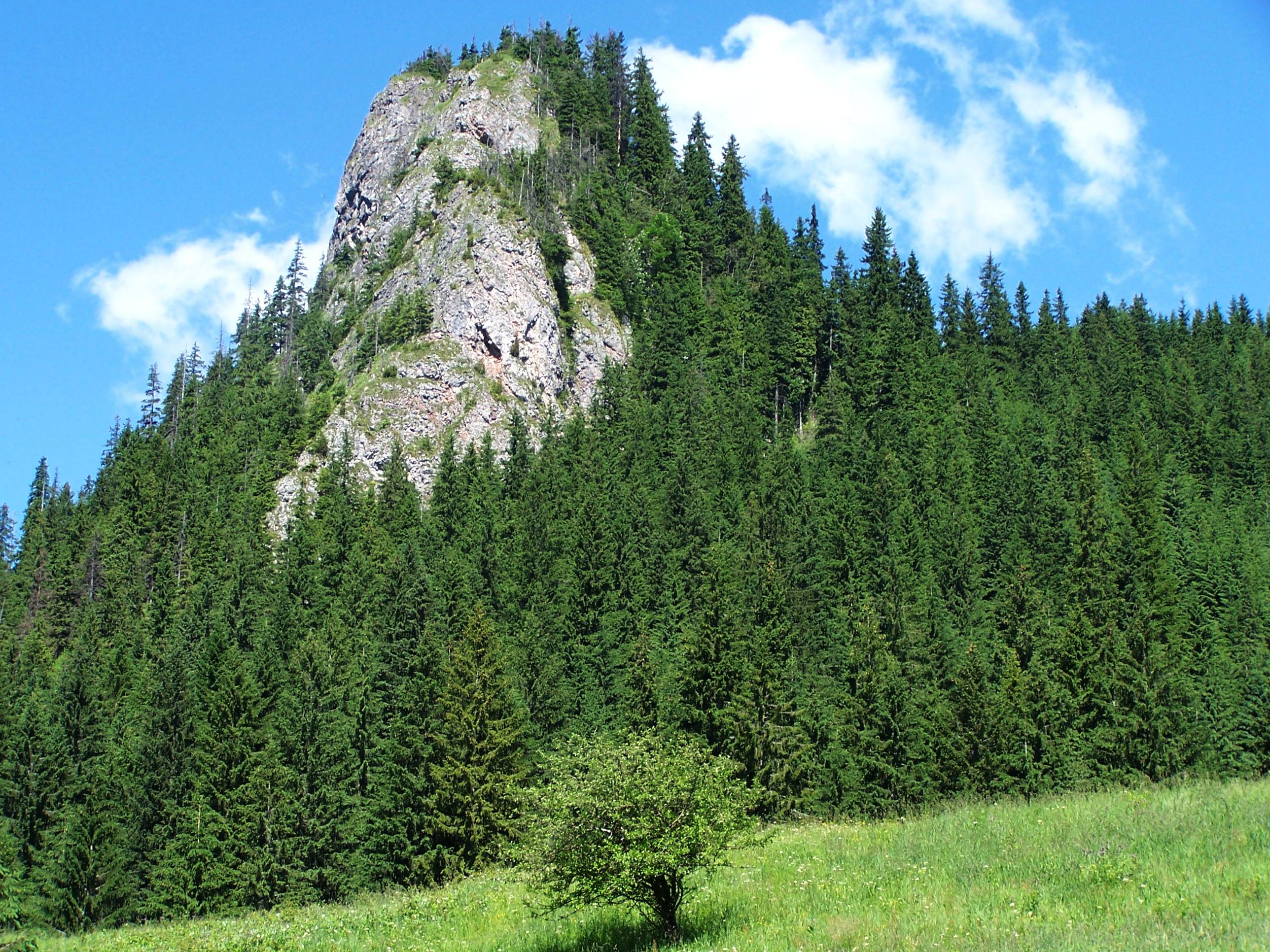 Zawiesista Turnia- widok z Doliny Miętusiej